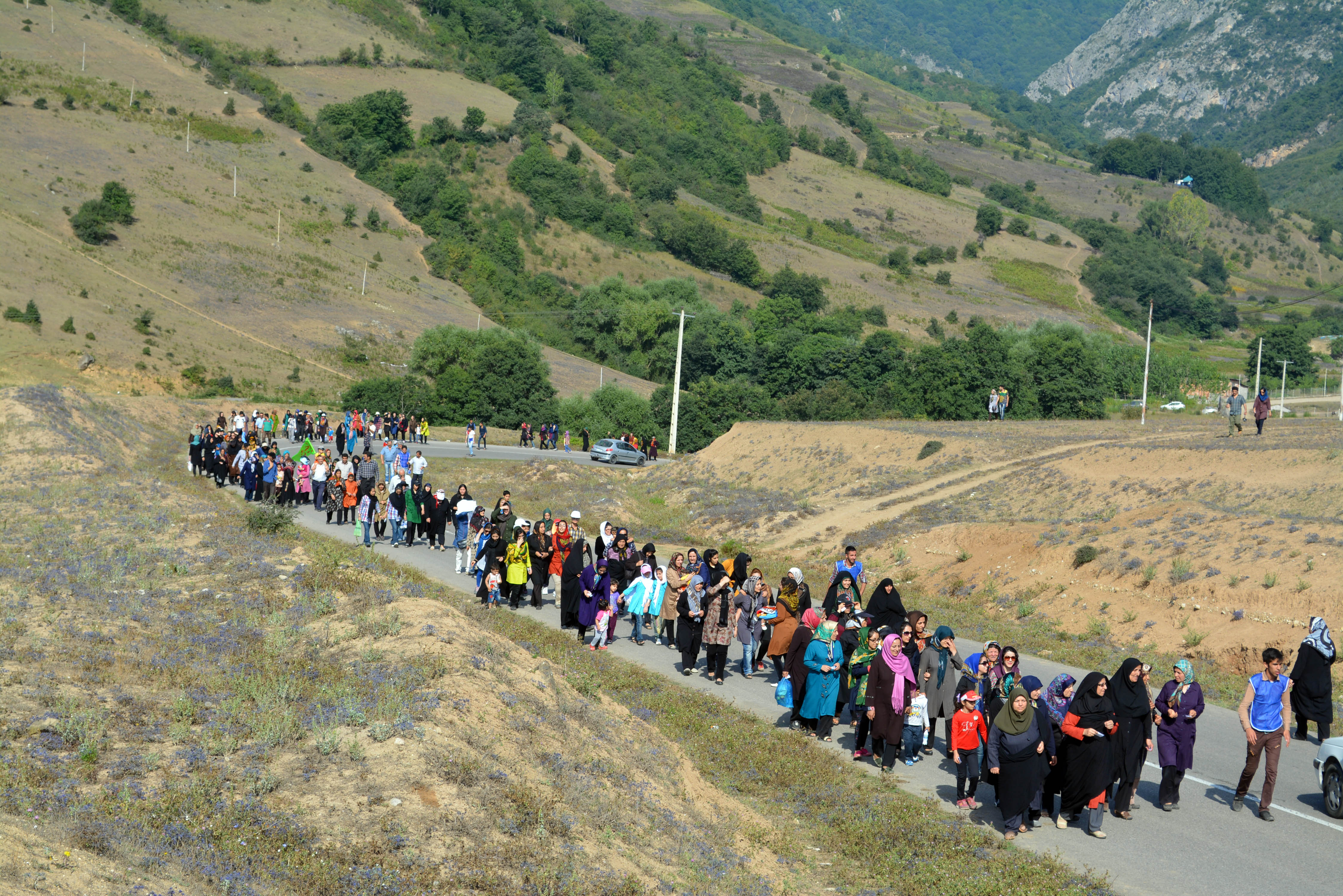 پیاده روی